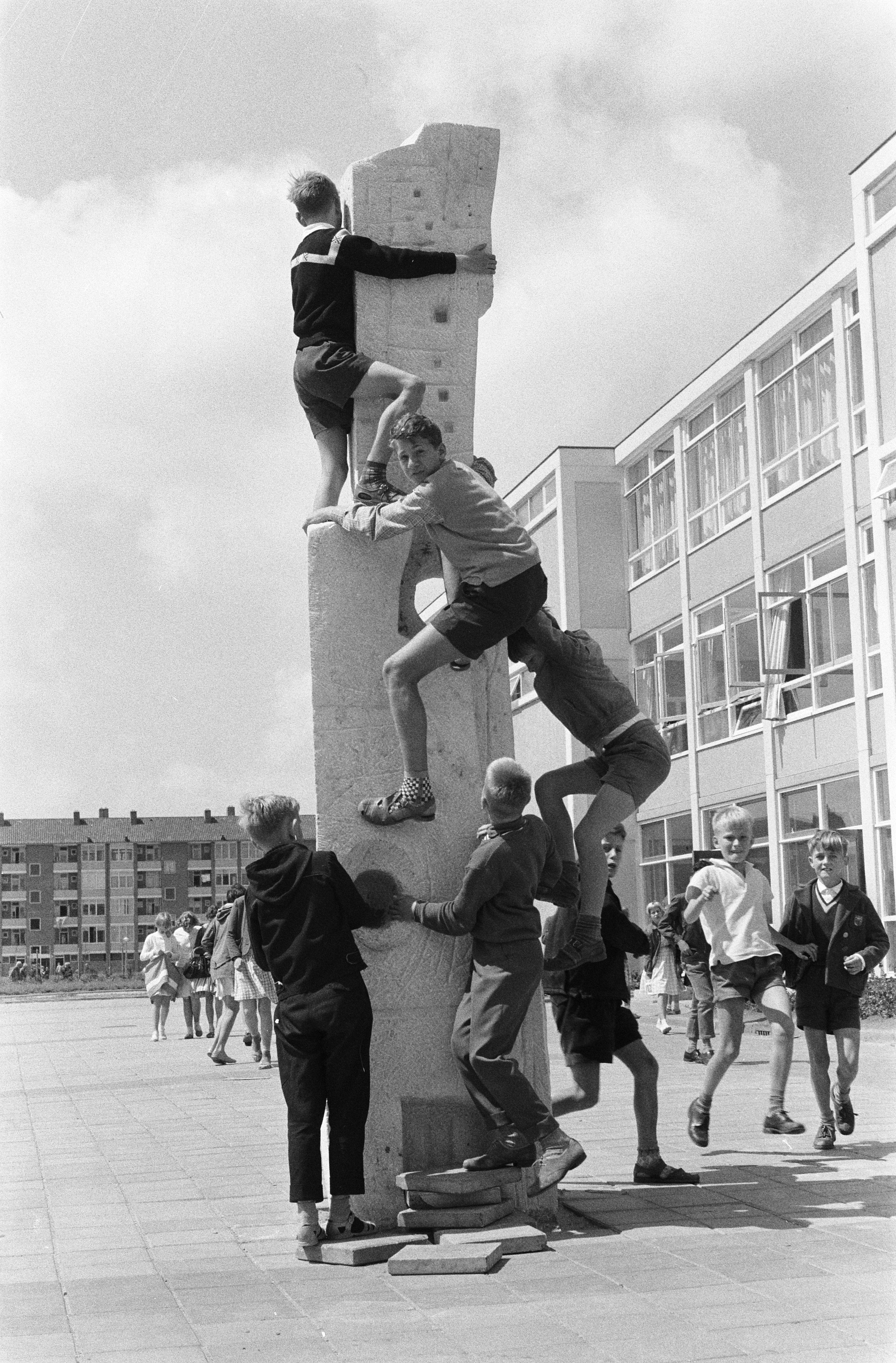 Collectie / Archief : Fotocollectie Anefo Reportage / Serie : [ onbekend ] Beschrijving : Beeldhouwwerken bij "Permanente Scholen" in Amsterdam, jeugd bij buutpaal Datum : 12 juli 1960 Locatie : Amsterdam, Noord-Holland Trefwoorden : beeldhouwwerken, kinderen, scholen Fotograaf : Pot, Harry / Anefo Auteursrechthebbende : Nationaal Archief Materiaalsoort : Negatief (zwart/wit) Nummer archiefinventaris : bekijk toegang 2.24.01.05 Bestanddeelnummer : 911-4183 Reacties Geplaatst door Maaike op 30 juli 2008 - 11:40. Deze school staat aan het Heijningspad 9 te Amsterdam-Osdorp en was toen de Nederlands Hervormde Lagere School (Christelijke School voor Lager Onderwijs) Geplaatst door J.C. Huisson op 23 oktober 2011 - 12:50. sorry, maar dat klopt echt niet. Het gaat om de Heimansschool aan de Notweg. Ik heb daar van jan. 1959 (begonnen in een noodgebouwtje) tot juli 1961 op gezeten. Op Schoolbank is de buutpaal op een aantal foto's te zien, onder andere op "Klassenfoto 6e klas de meisjes 1968 - 1969". Geplaatst door Amsterdammertje op 06 februari 2017 - 17:34. 'Buutpaal' van beeldhouwer H.A. Bal